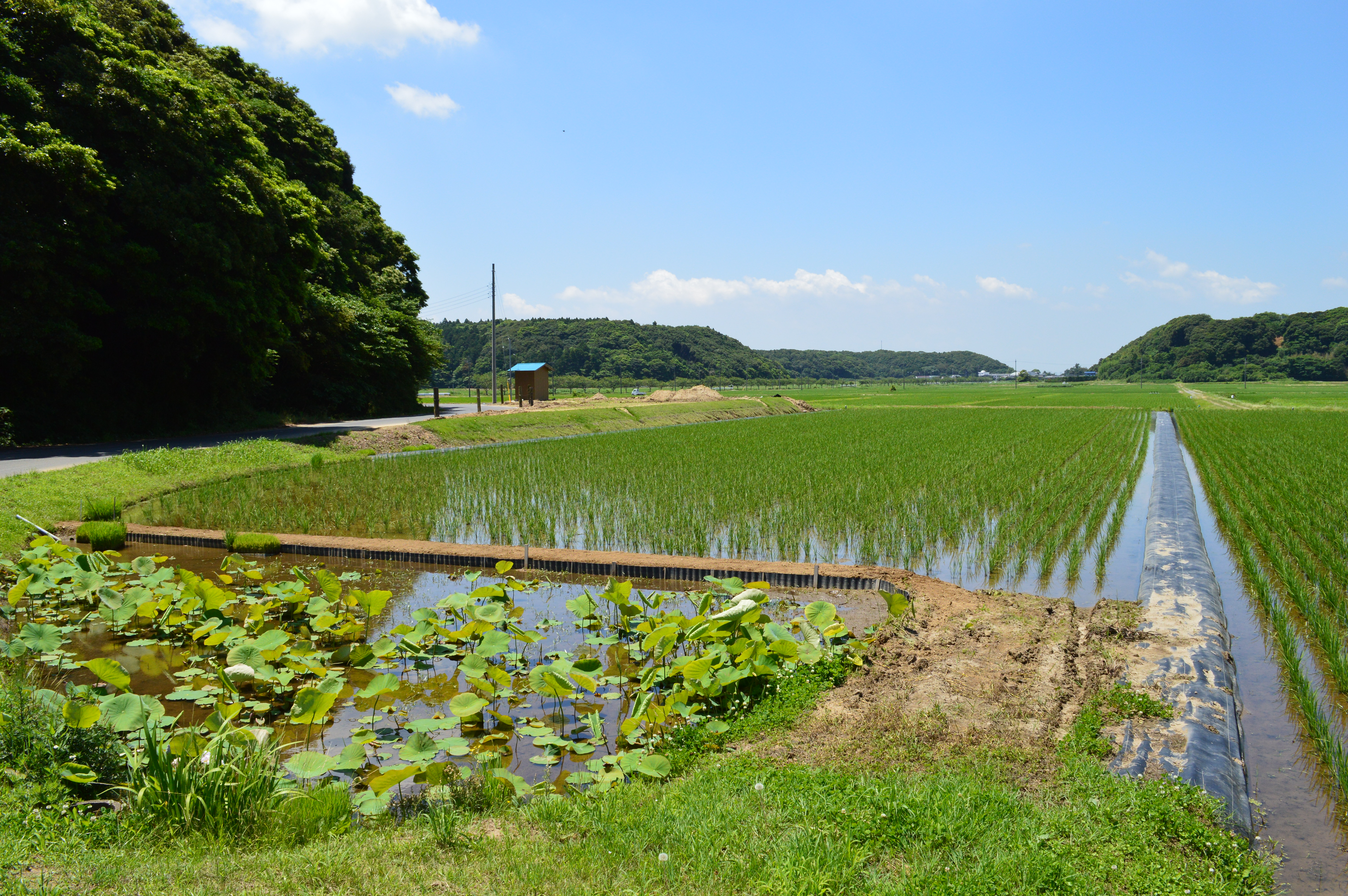 鹿嶋市田谷の田園風景